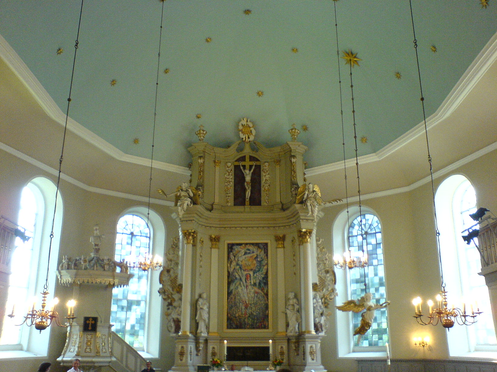 Die evangelisch-lutherische Christianskirche - manchmal auch Klopstockkirche genannt - in Hamburg-Ottensen, Chor.